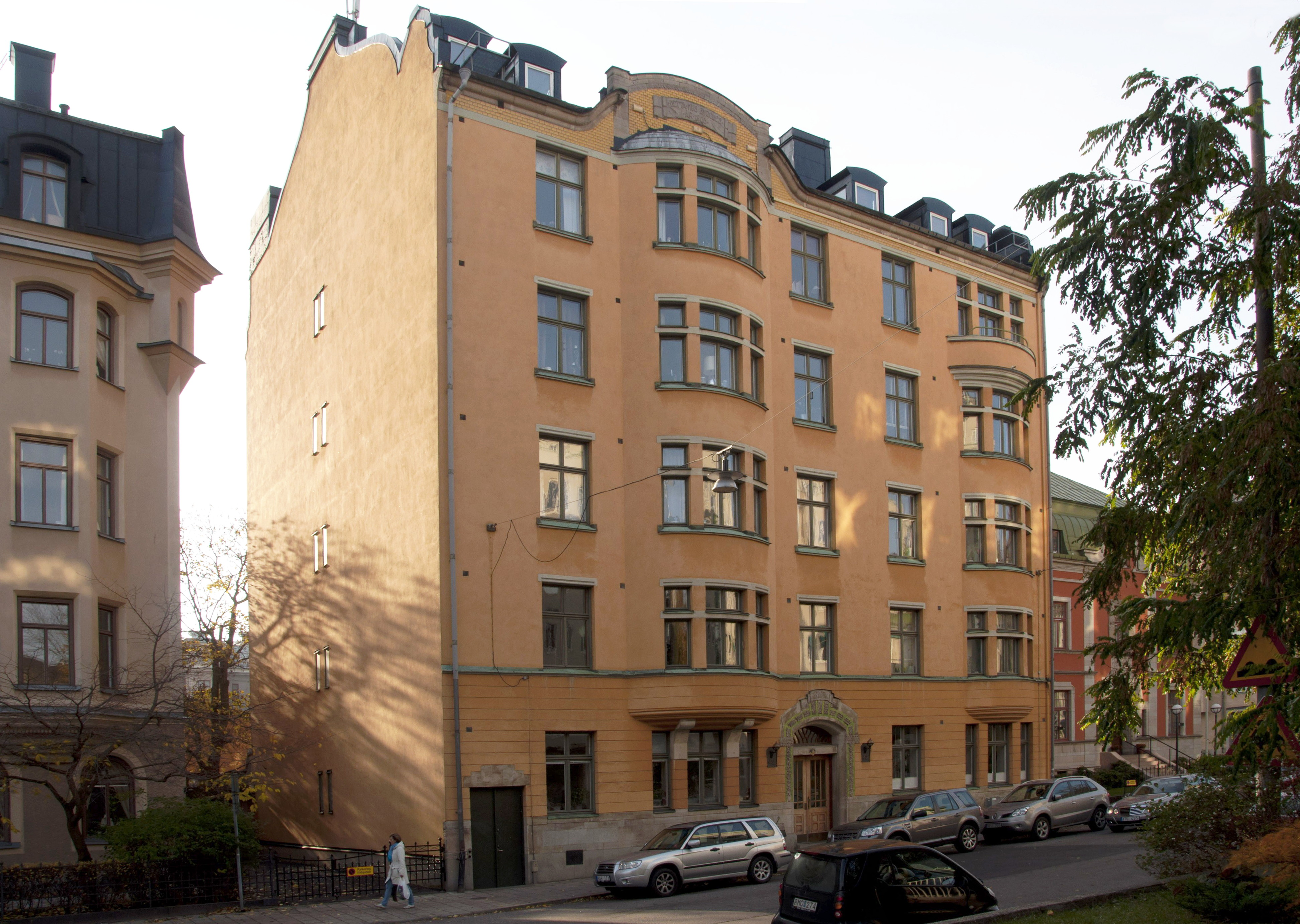 Östermalmsgatan 42. Byggnadsår 1902-04, arkitekt Erik Lallerstedt, byggherre Johan Erik Cederblom, byggmästare K J Flodin